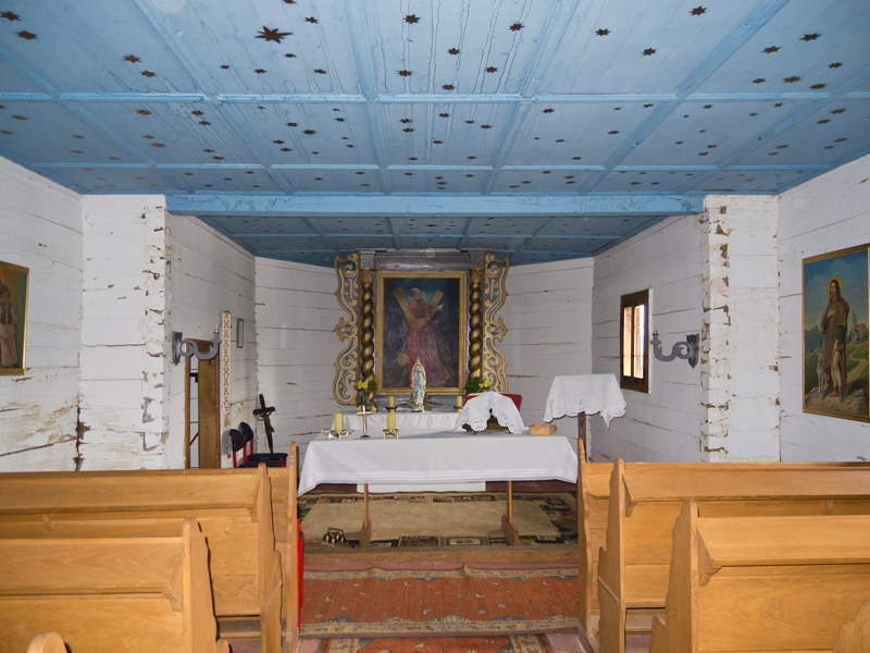 Lipik Drvena kapela sv. Andrije u Brezinama